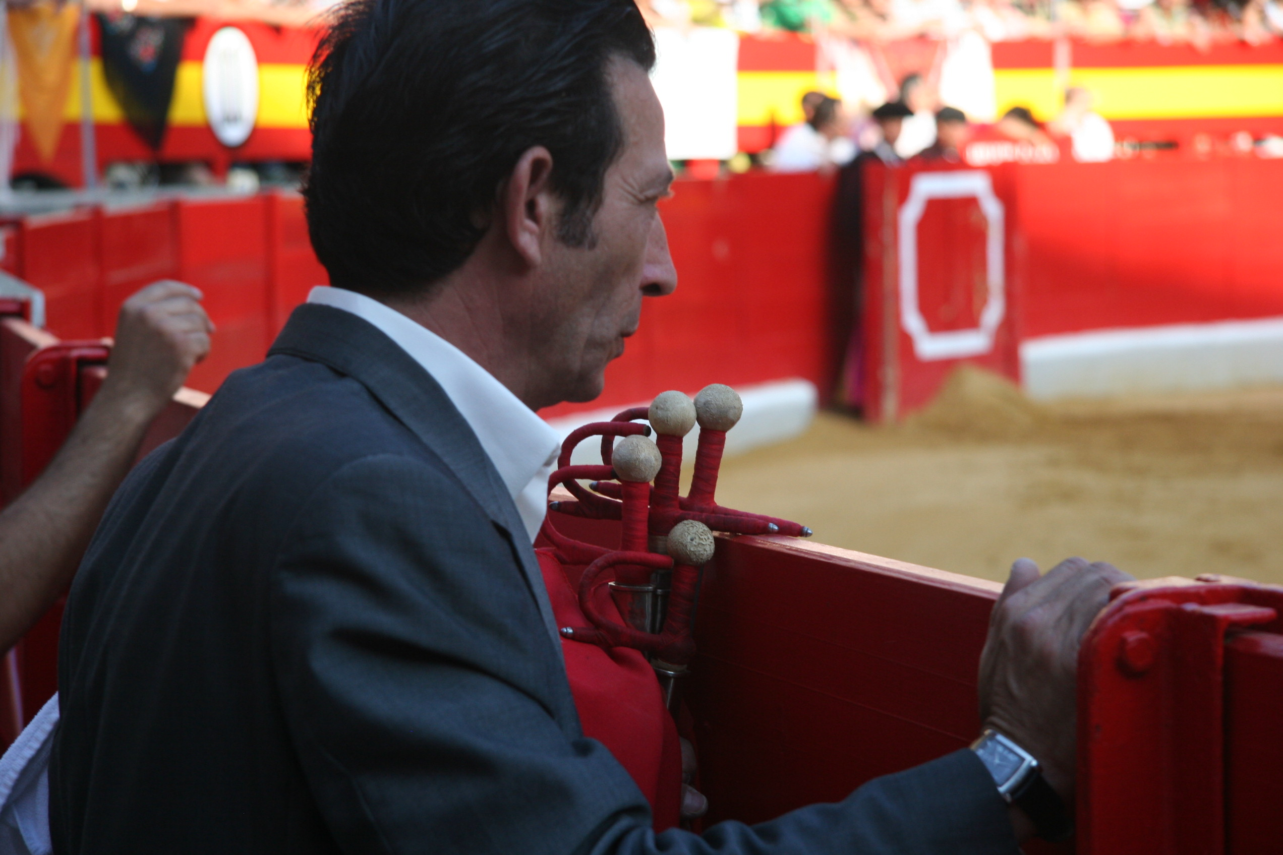 Antonio Márquez Casín, mozo de espadas